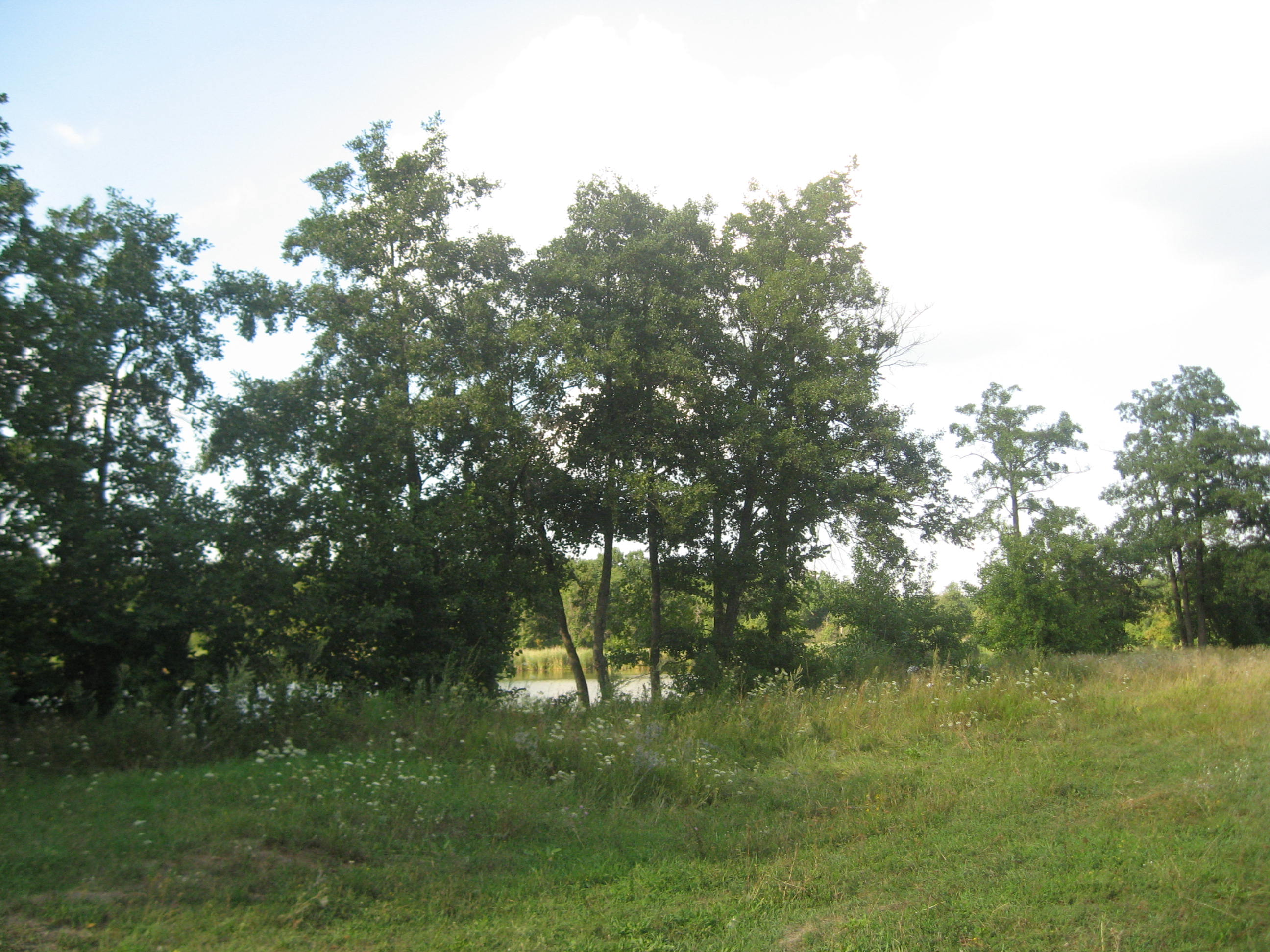 Виден берег.